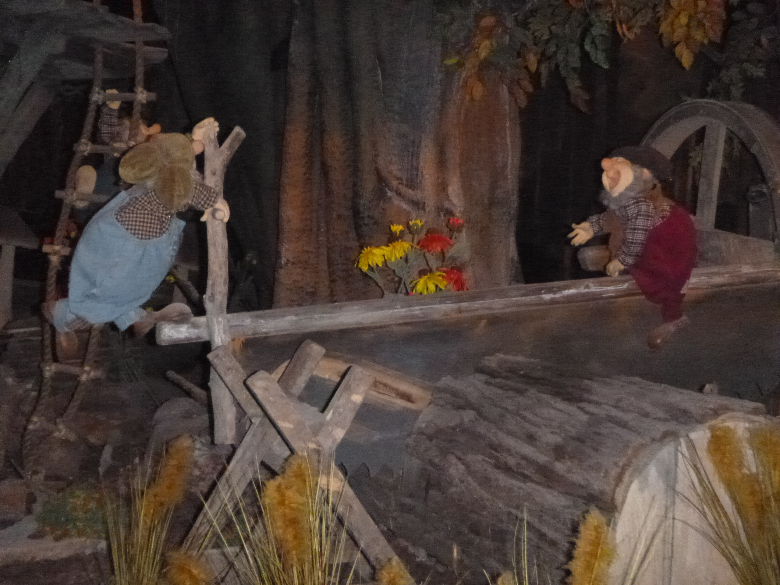 Foret de Plop Bucherons